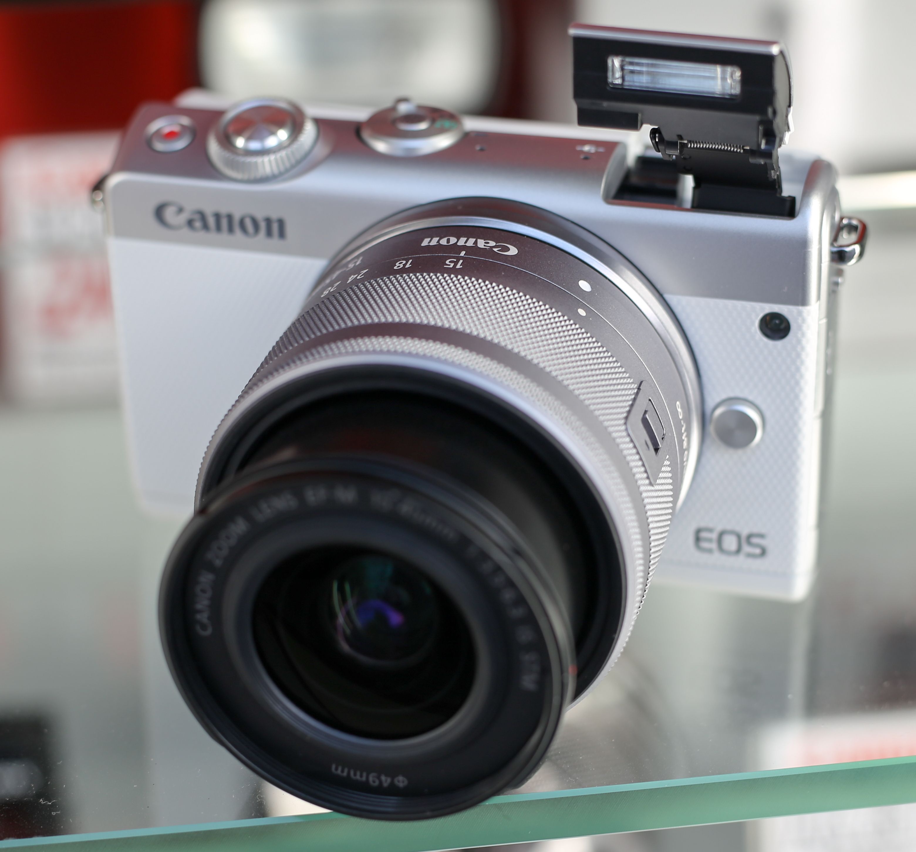 CANON EOS M100